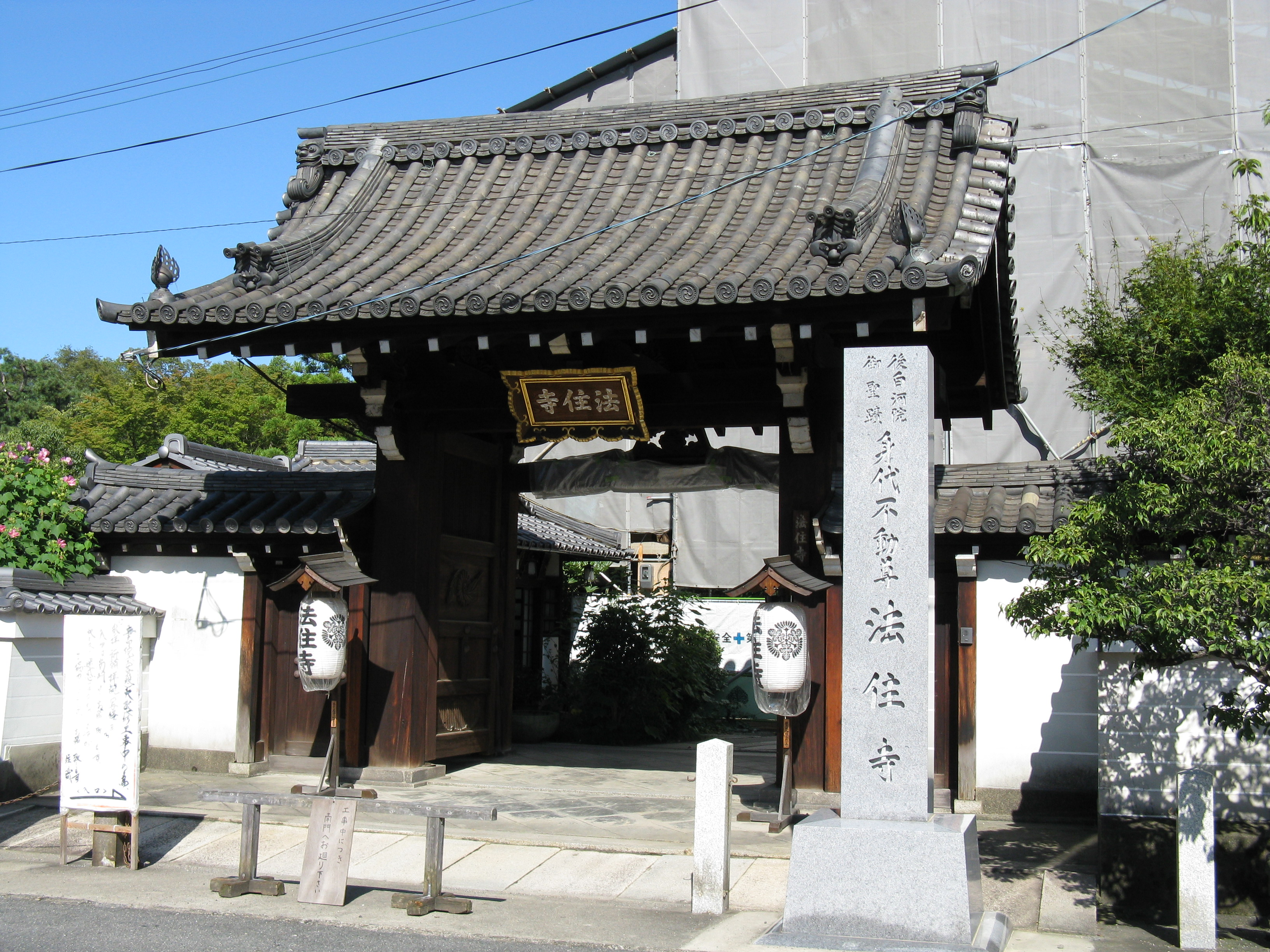 法住寺